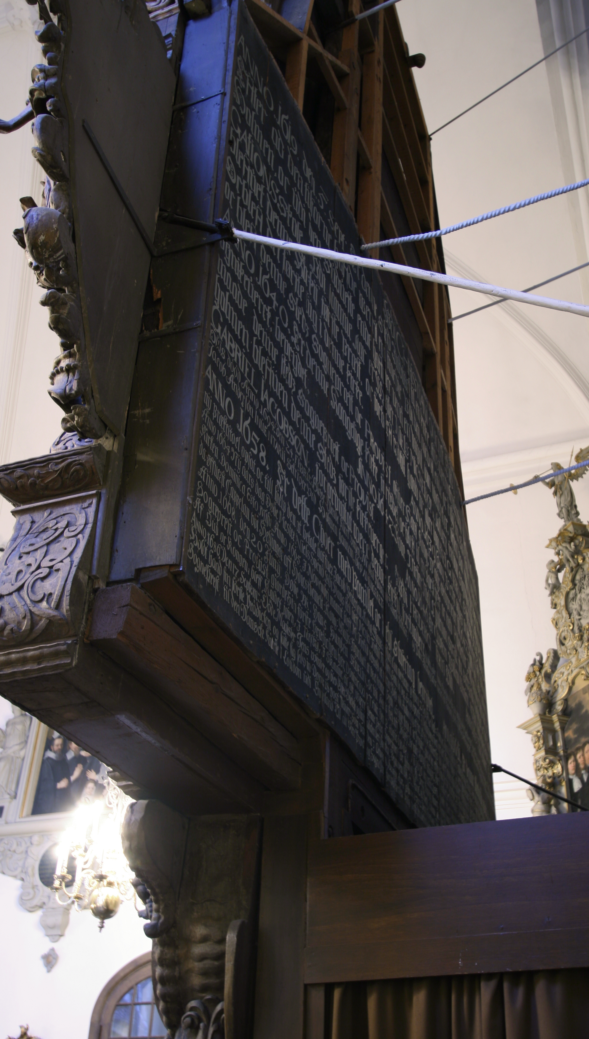 Holmens Kirke, Copenhagen, Denmark . Bagsiden af altertavlen, med kirkens historie op til o.1700.